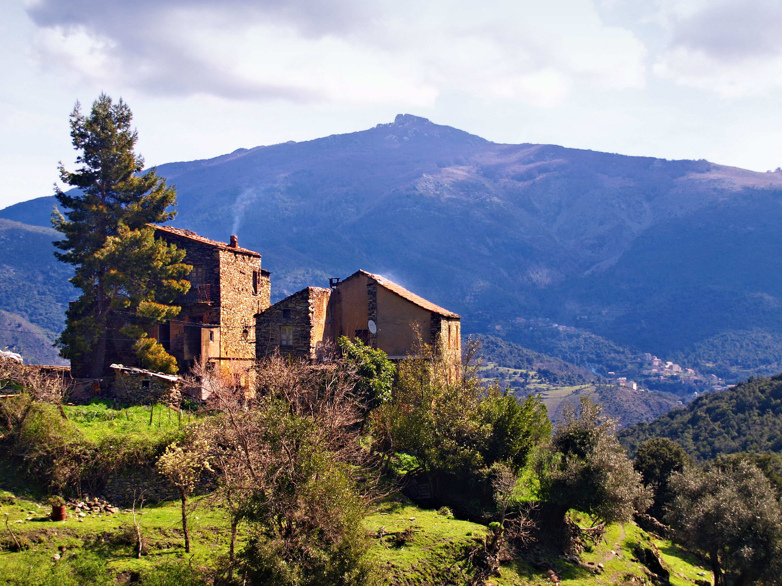 Lano, Castagniccia (Corse) - Village et Monte San Petrone (1767m). À droite, le village de San-Lorenzo